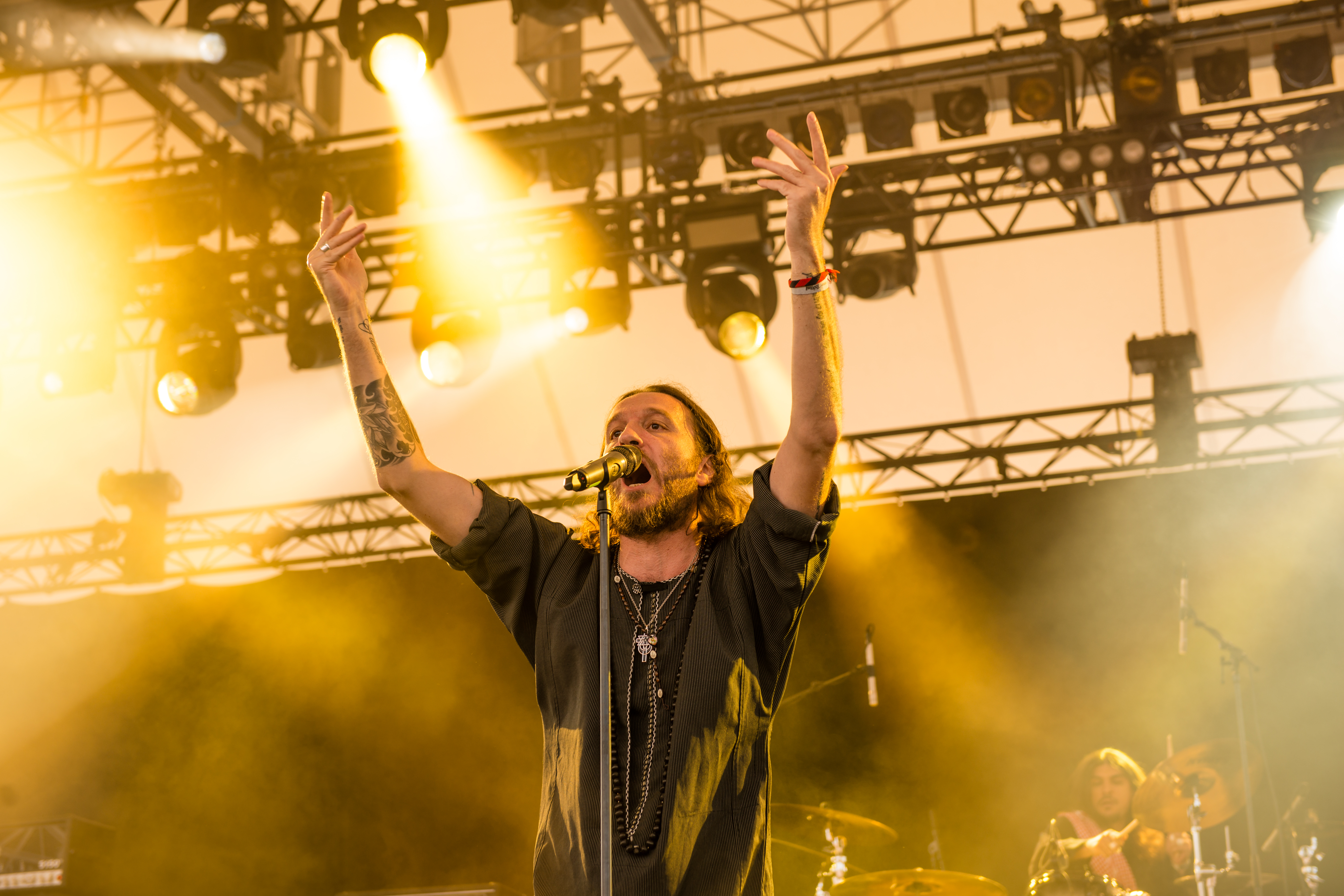 'Rock Hard Festival 2014 - Gelsenkirchen': 'Orphaned Land'